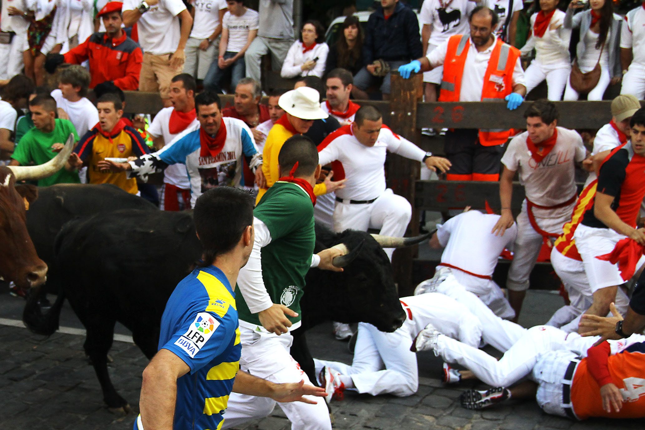 Un montón de mozos caídos, el toro pasa de largo.